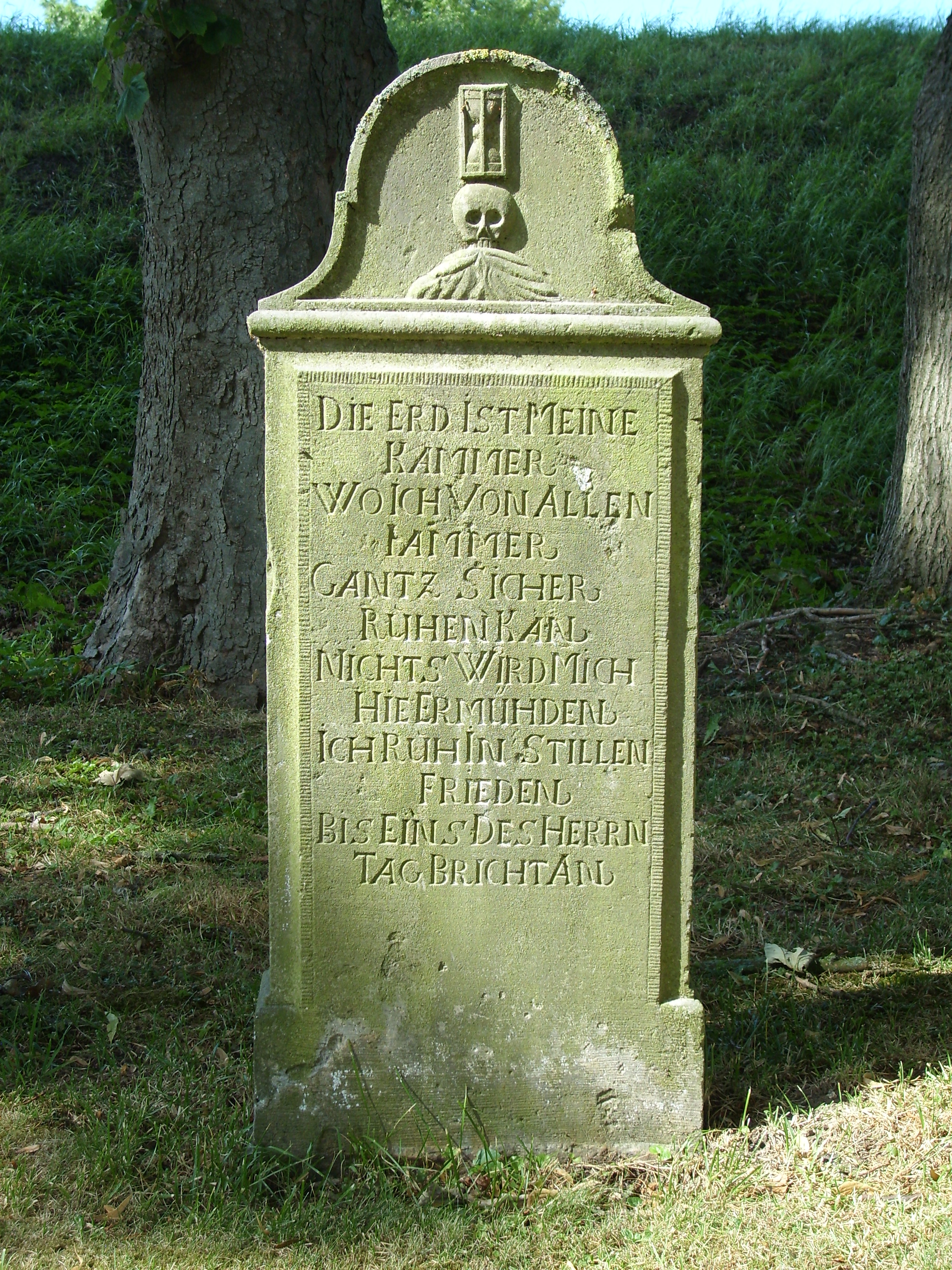 Grabplatte auf dem Kirchhof der St.-Nicolai-Kirche Beidenfleth